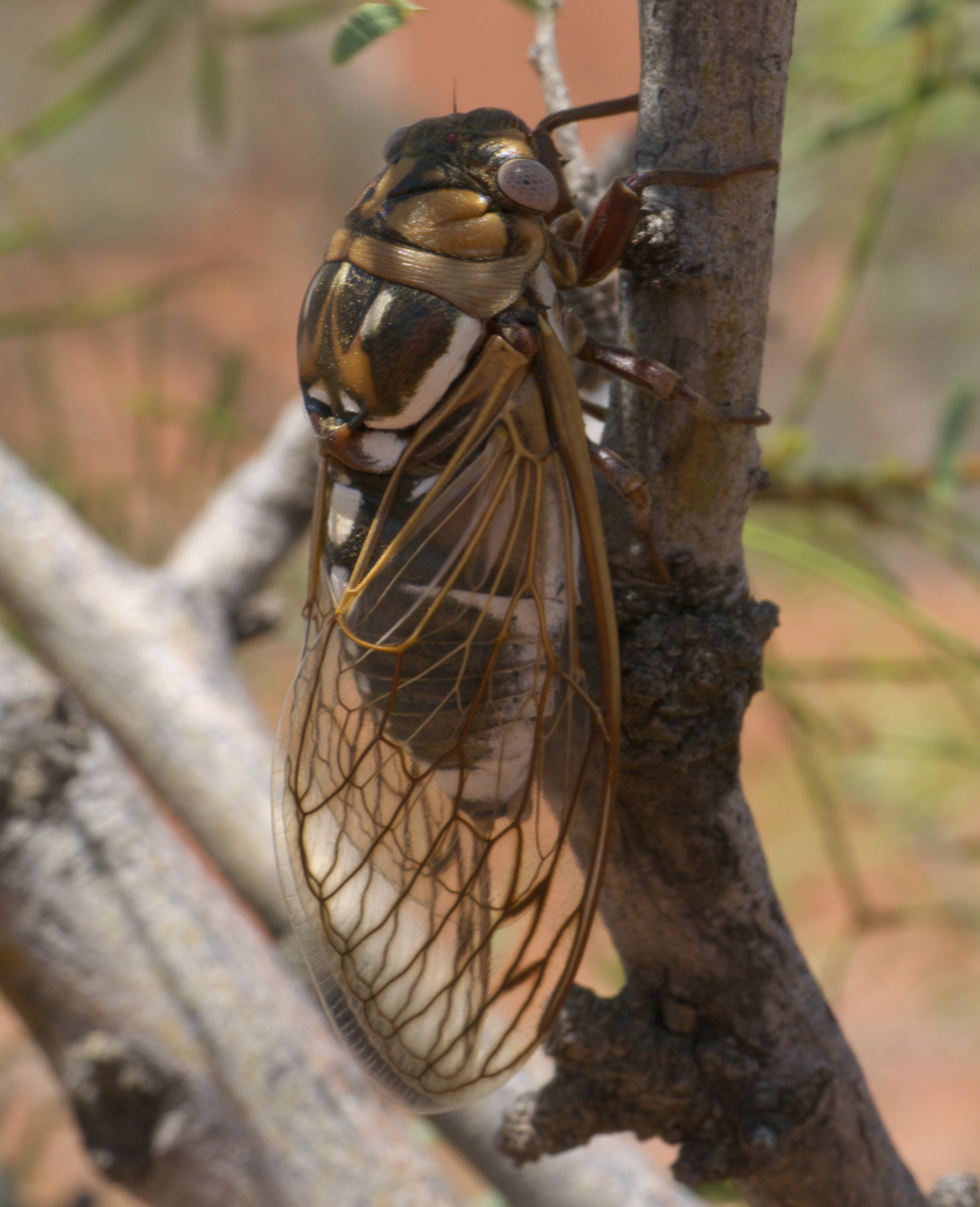 Megatibicen dorsatus, Bush Cicada, ID Confidence: 98